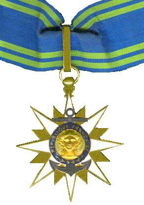 eigen tekenwerk